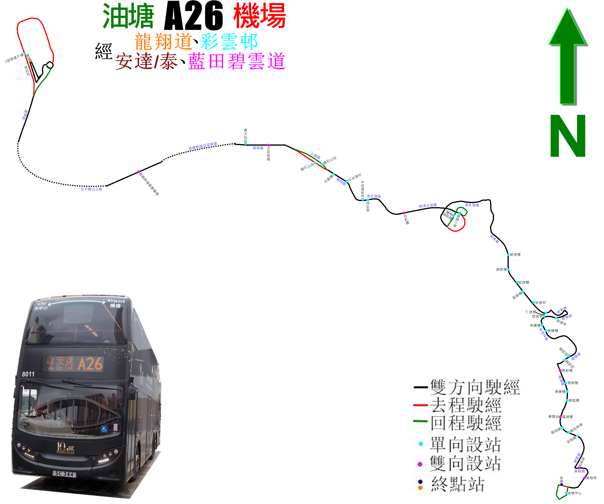 城巴機場快線A26線的走線圖